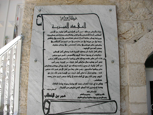 לוח בחצר מסגד עומר בירושלים